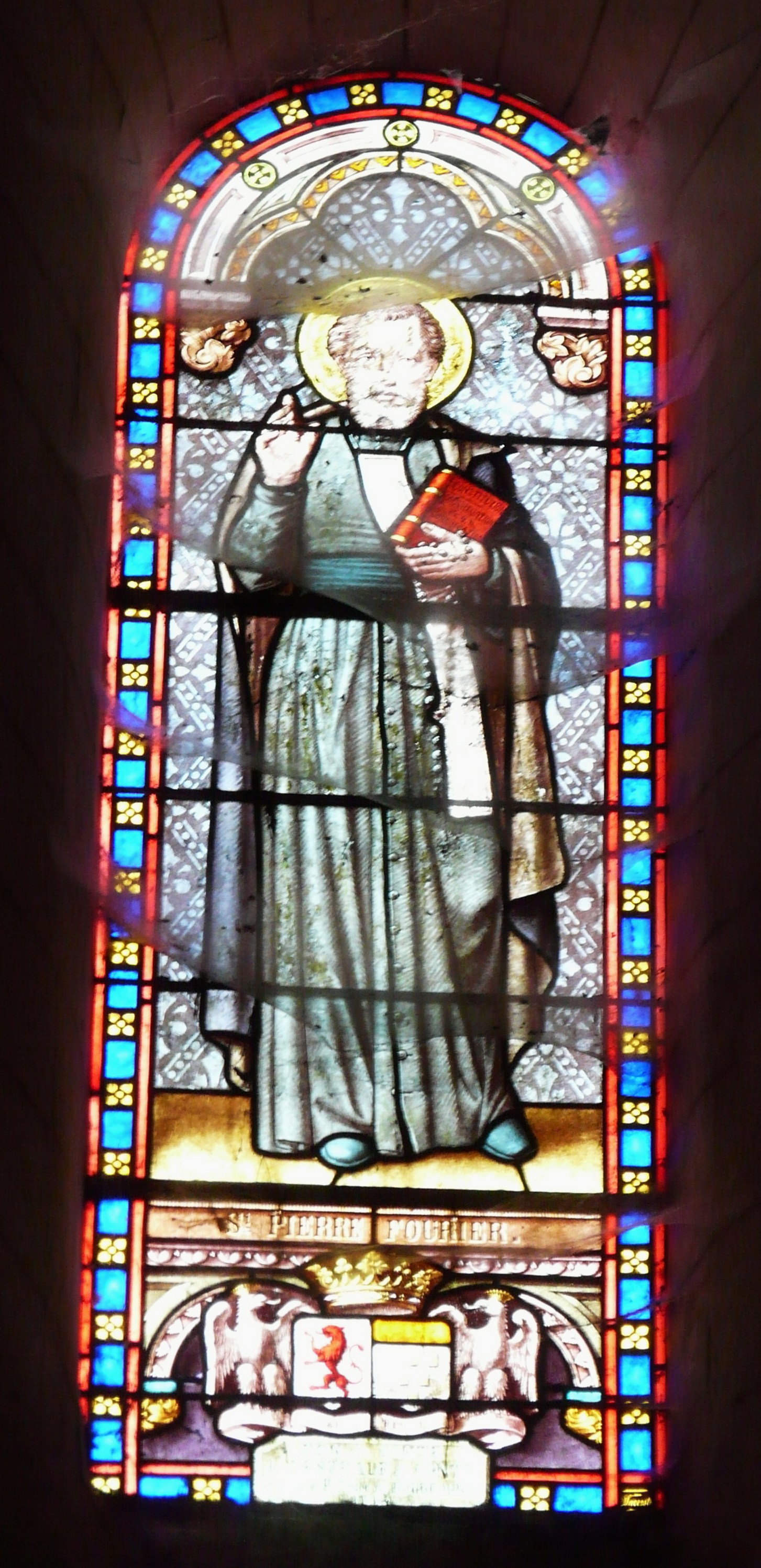 Vitrail représentant saint Pierre Fourier, église Saint-Martin, Coulaures, Dordogne, France